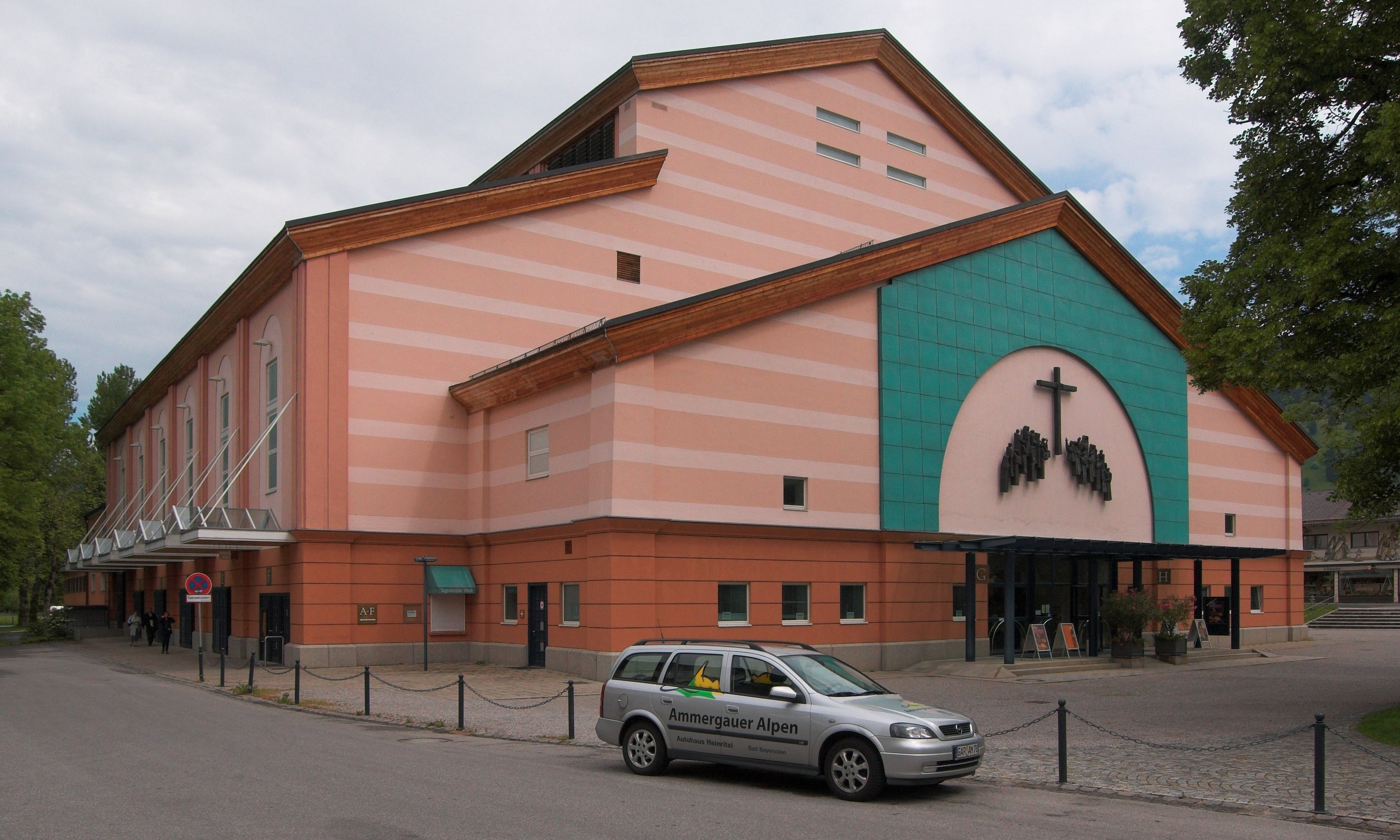 Festspielhaus in Oberammergau